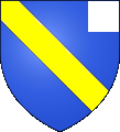 Wappen des Geschlechts "Windeck" aus der Ortenau/Baden